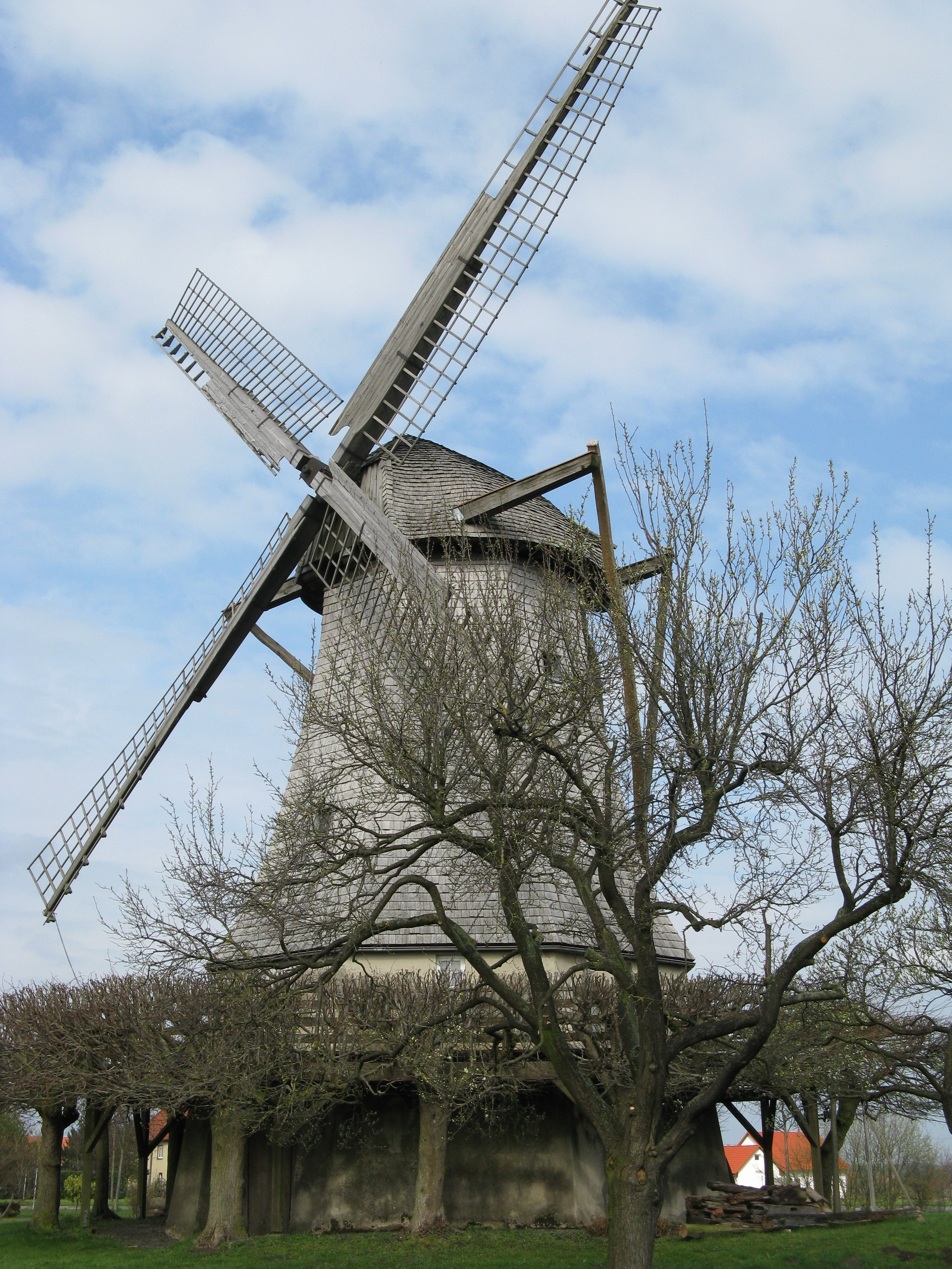 Windmühle Destel This image shows a heritage building in Germany, located in the North Rhine-Westphalian city Stemwede (no. 043).